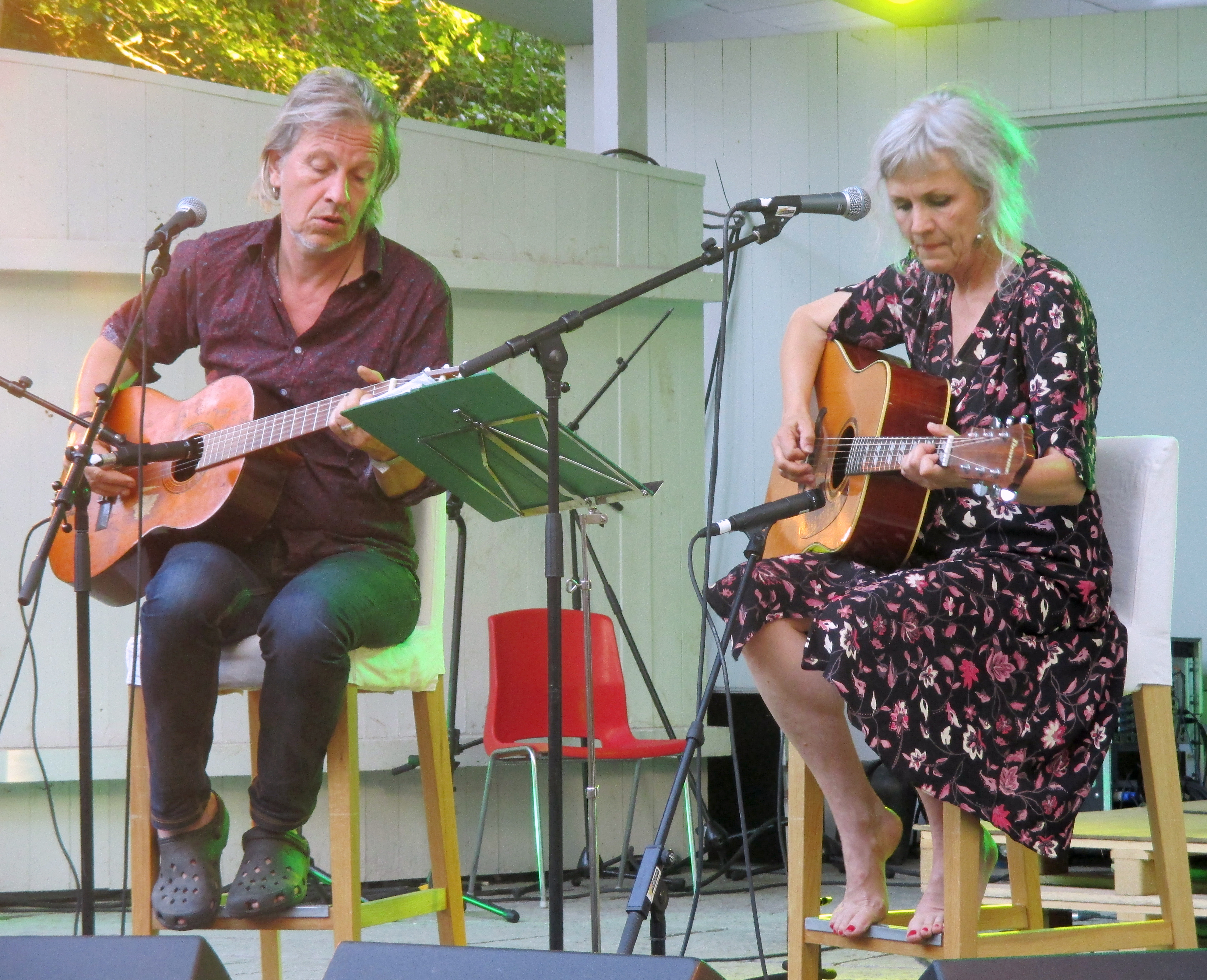 Stefan Sundström och Karin Renberg spelar på Musik i Plantis 2014-07-22 i Amfiteatern i Planteringsförbundets park i Falköping, Falköpings kommun, f.d. Skaraborgs län, Västergötland, Västra Götalands län, Sverige.